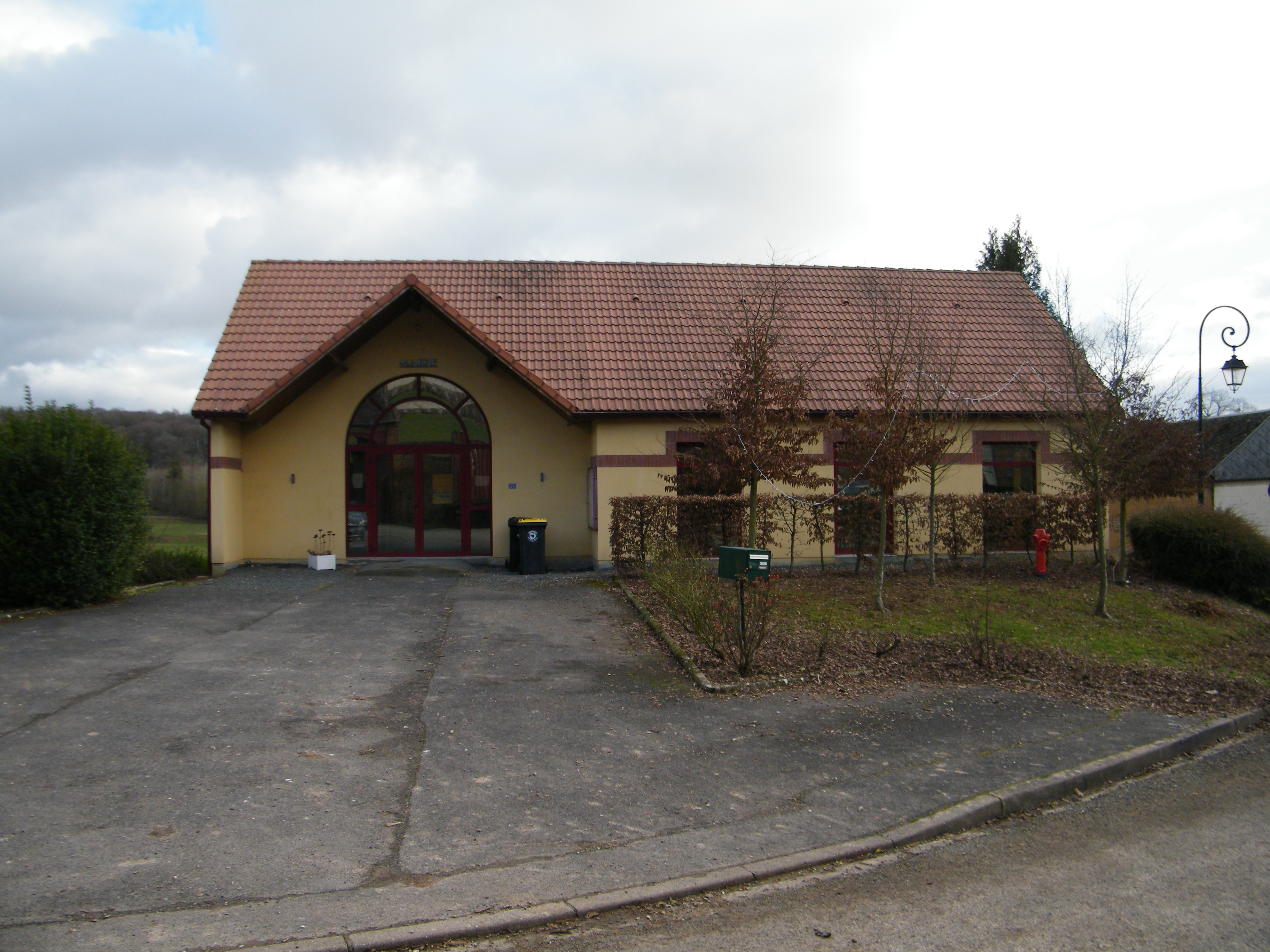 Avesnes-Chaussoy, Somme, Fr , mairie